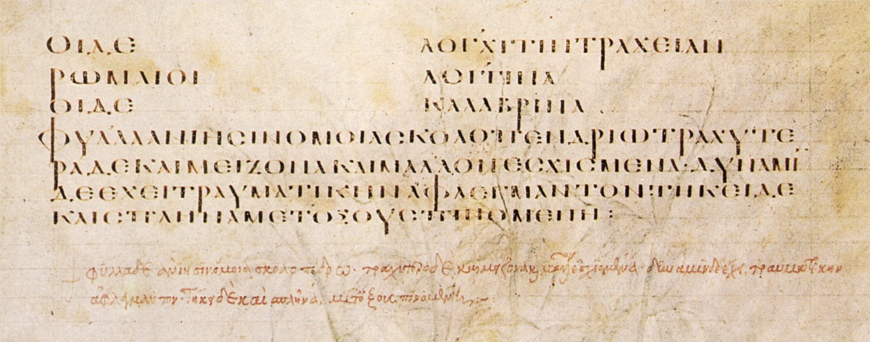 Griechische „Bibelmajuskel“ und darunter in roter Farbe Transkription in Minuskelschrift im Wiener Dioskurides Manuskript. Der Text erläutert ein nebenstehendes Pflanzenbild „Andere Zungensumpfwurz“ (Rauer Wildfarn)